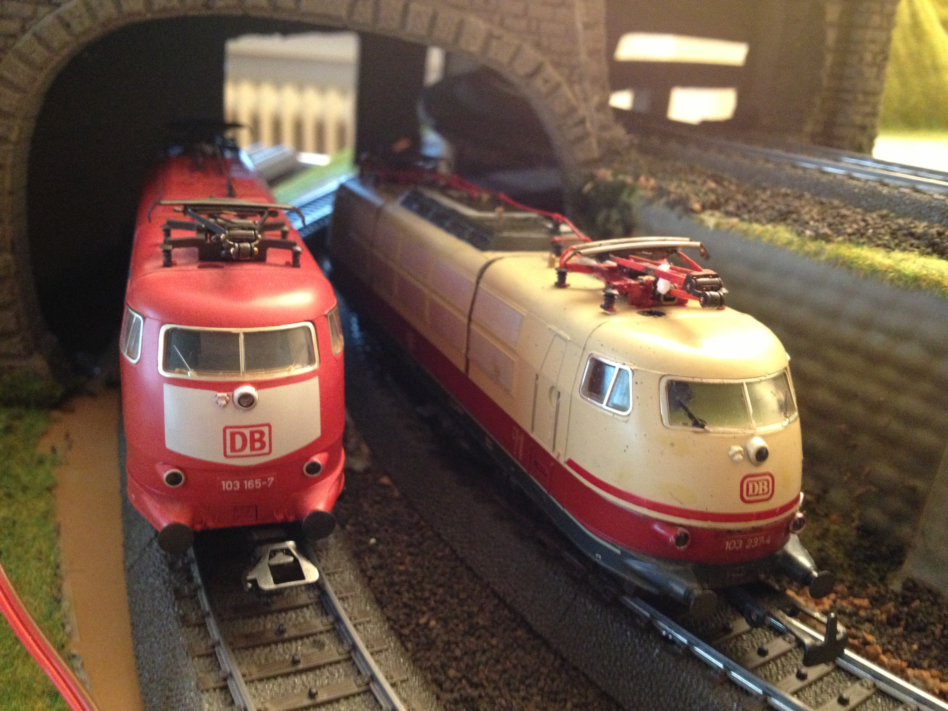 Meine 2 BR 103 - Modelle